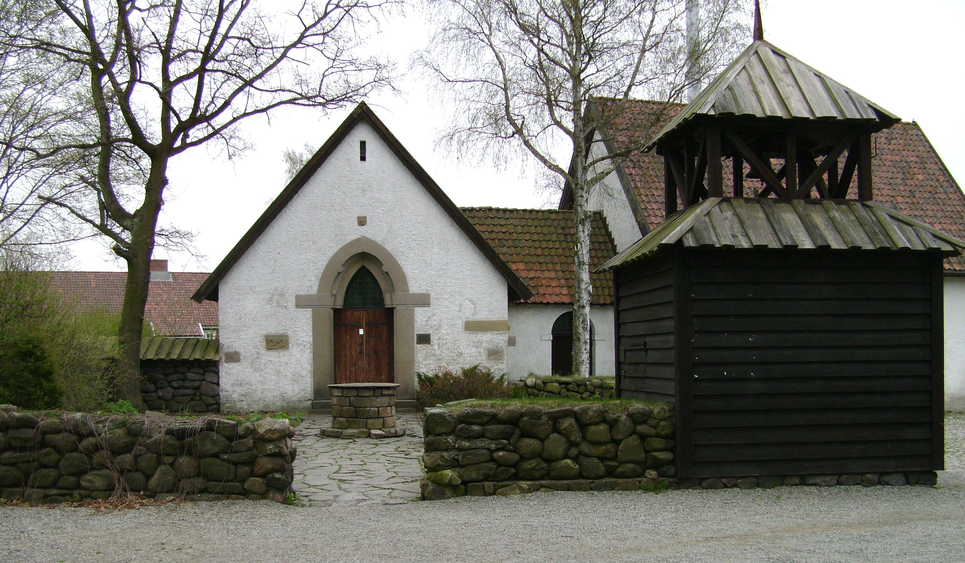 Park des Regionalmuseums von Østfold und Stadtmuseums Sarpsborg auf dem historischen Gelände der Gründung von Borg (heute Sarpsborg) im Jahr 1016